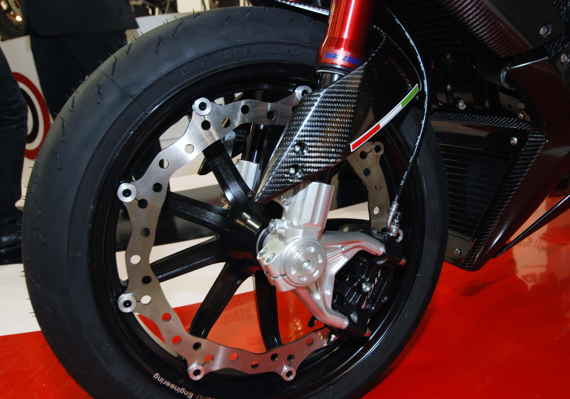 Roue avant et disque périmétrique de la Bimota DB9 Brivido